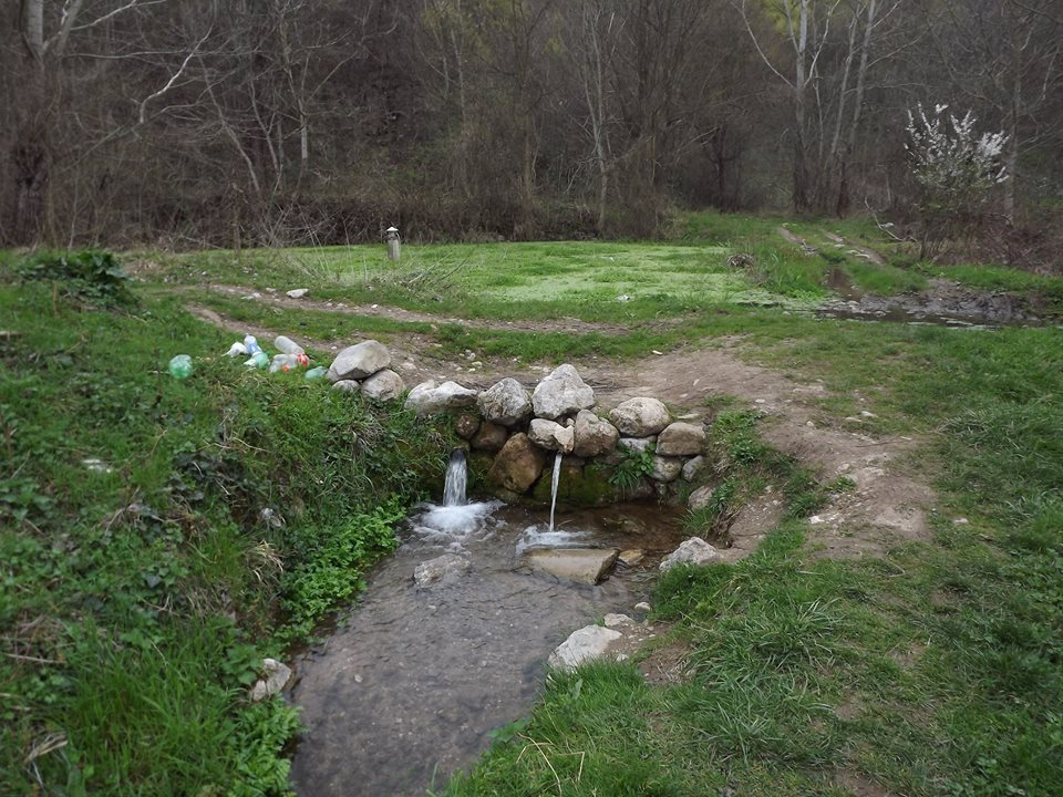 Srpski (latinica): Ostrovička Banjica, termomineralni izvori u Ostrovičkoj kotlini Sićevačke klisure.